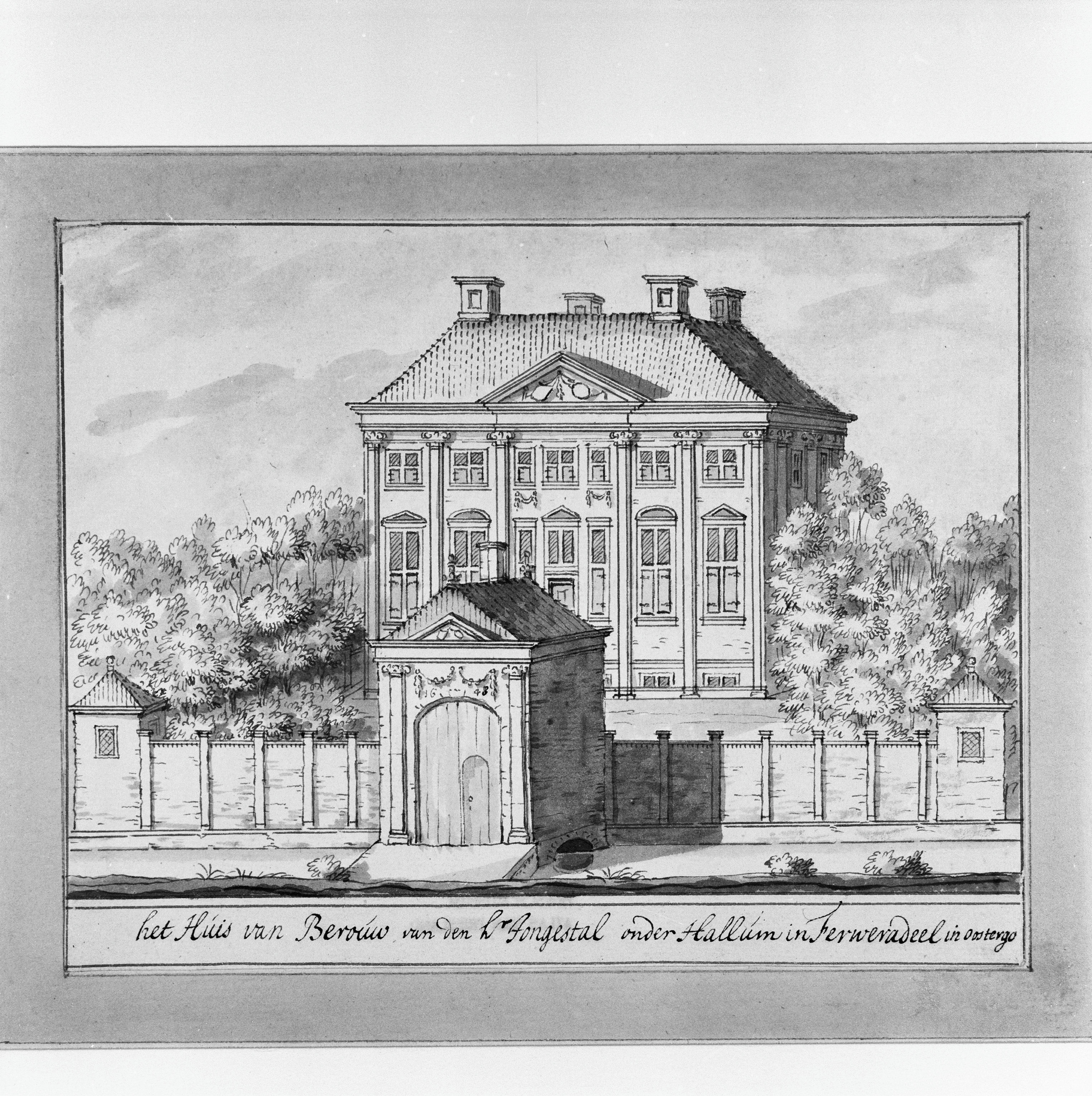 Huis van Berouw: tekening door Dhr. Stellingwerf uit Prentenkabinet Fies Museum